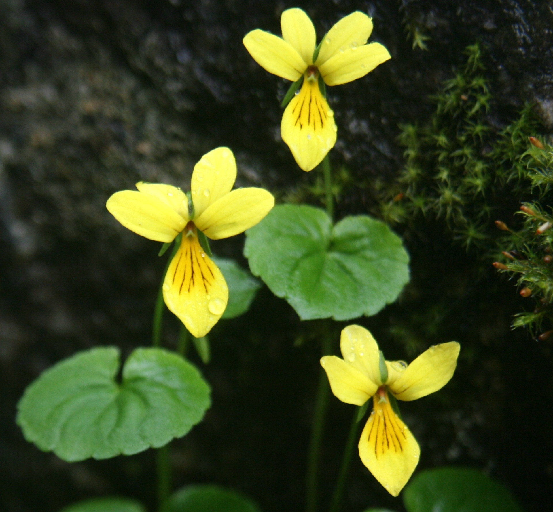 キバナノコマノツメ 木曽駒ヶ岳にて